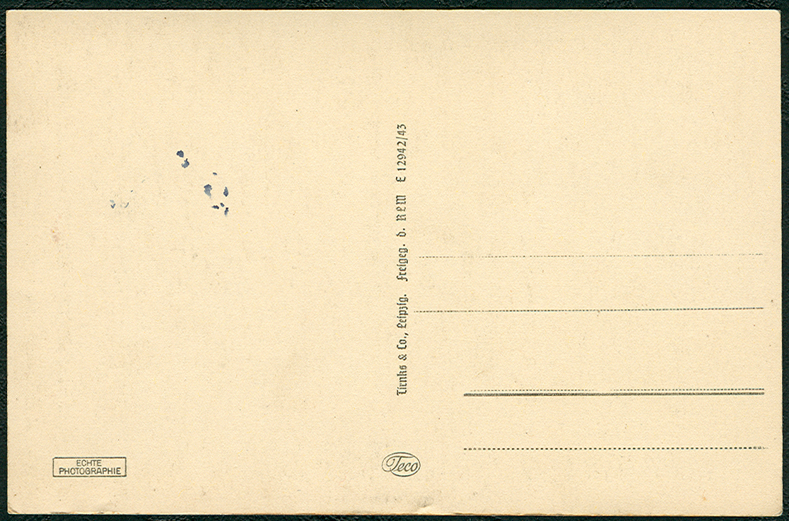 Rückseite der Ansichtskarte ...